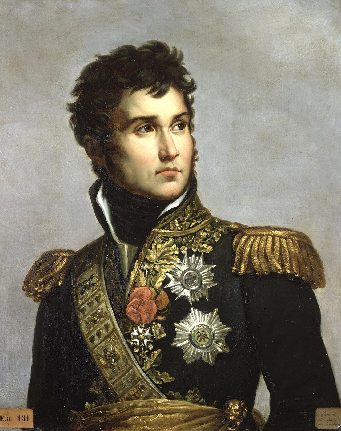 Copie en buste d'après le portrait en pied de Lannes par Gérard